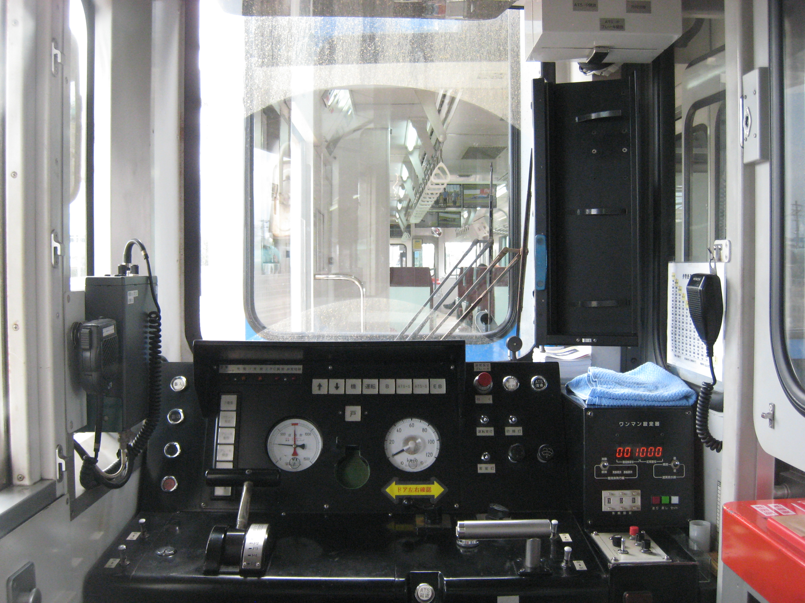 伊勢鉄道 イセⅢ形気動車運転台 ※F1開催時に2両編成の中間運転台で撮影